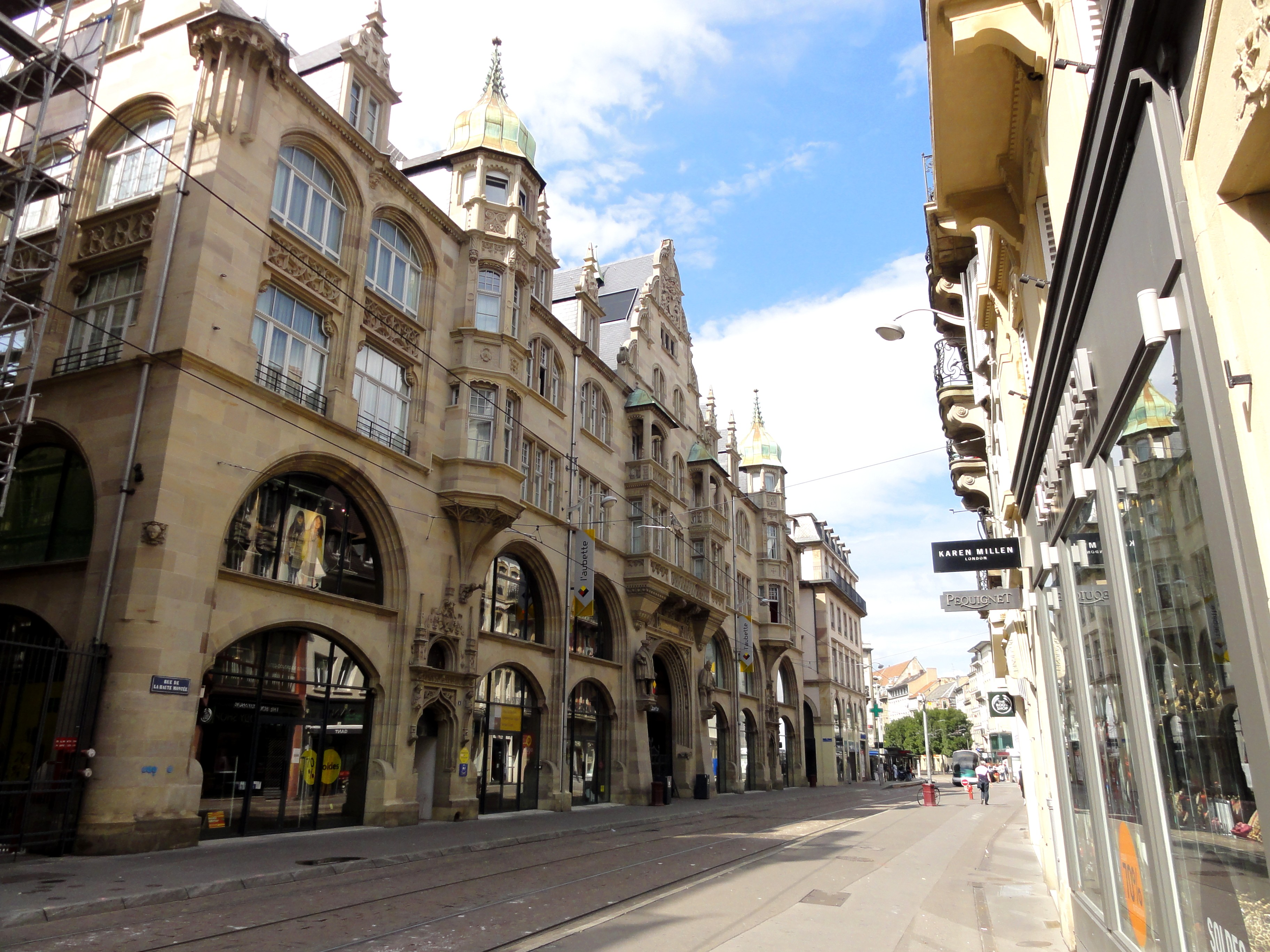 Alsace, Bas-Rhin, Strasbourg, Kleine Metzig ("Petites Boucheries") (1900), 4 rue de la Haute-Montée.